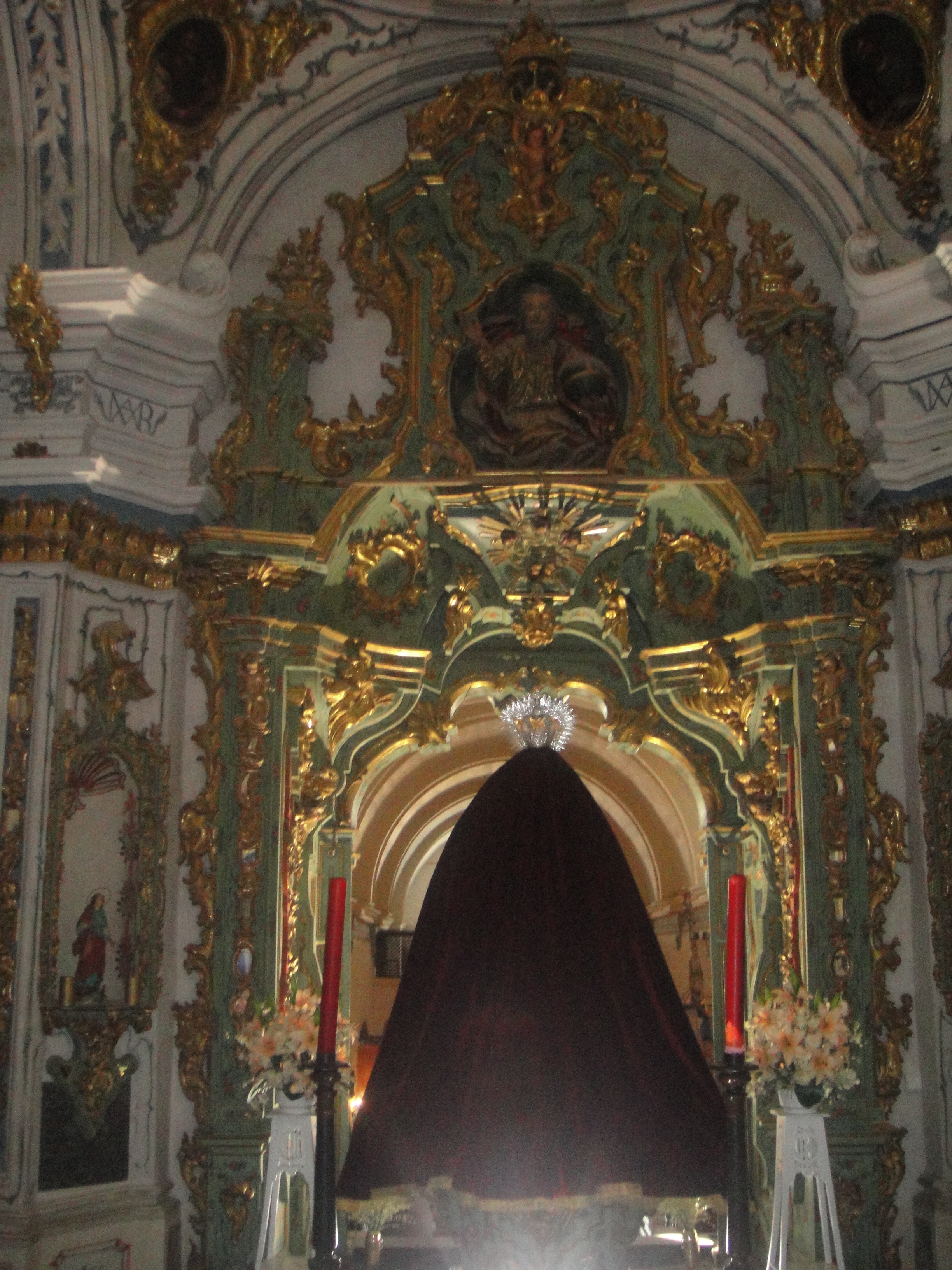 Interior del camarín de la iglesia de San Francisco de Fuente Obejuna, provincia de Córdoba, (España).